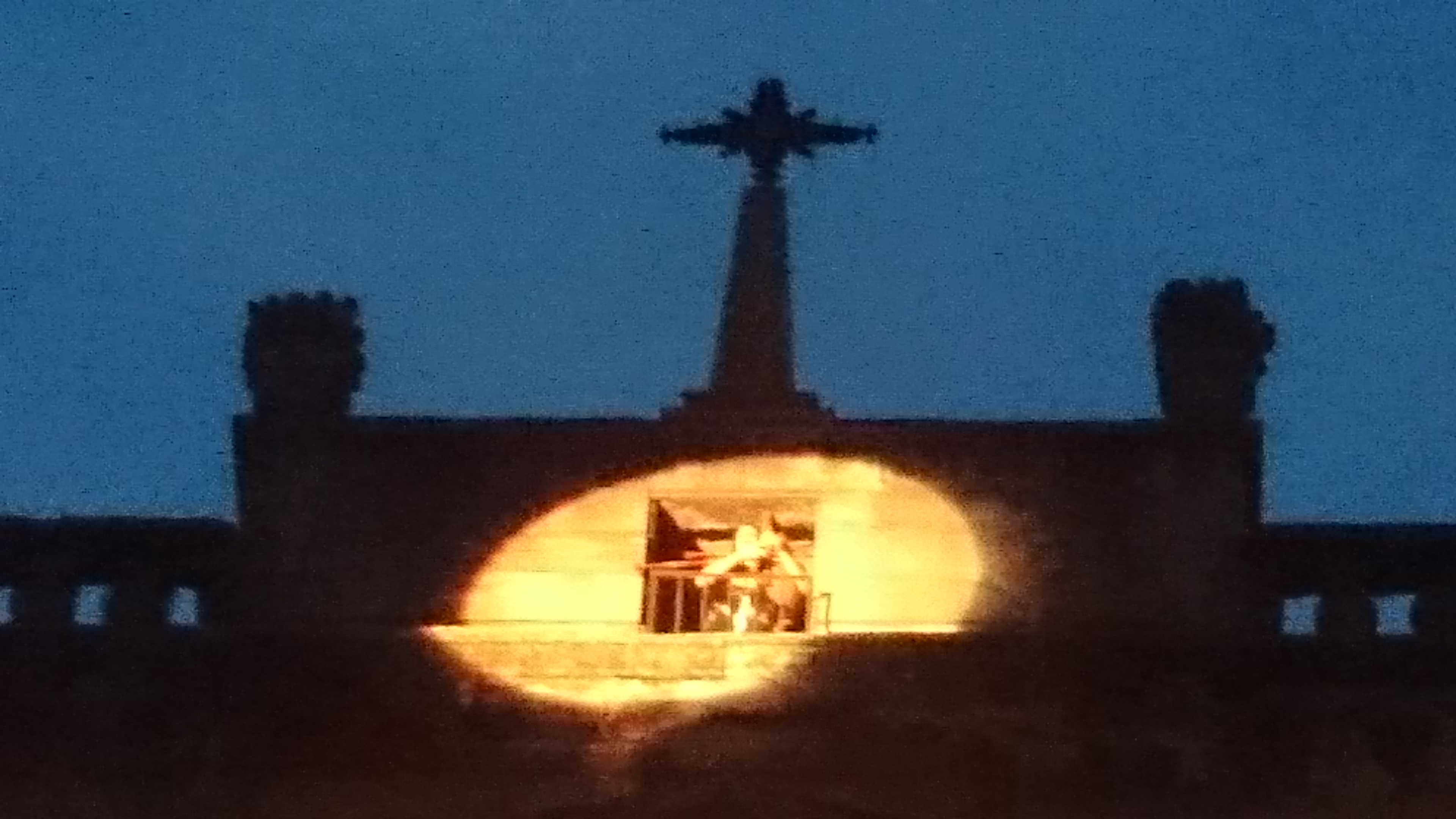 Tocada d'Inici del Cornamusam 2014 interpertada per Alba Logan